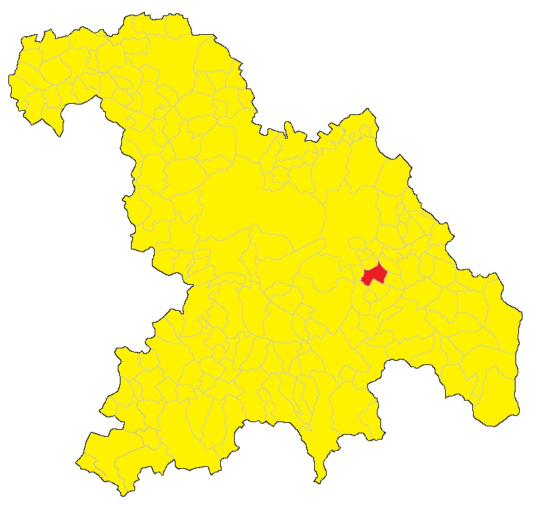 Mappa del comune di Carezzano (AL)